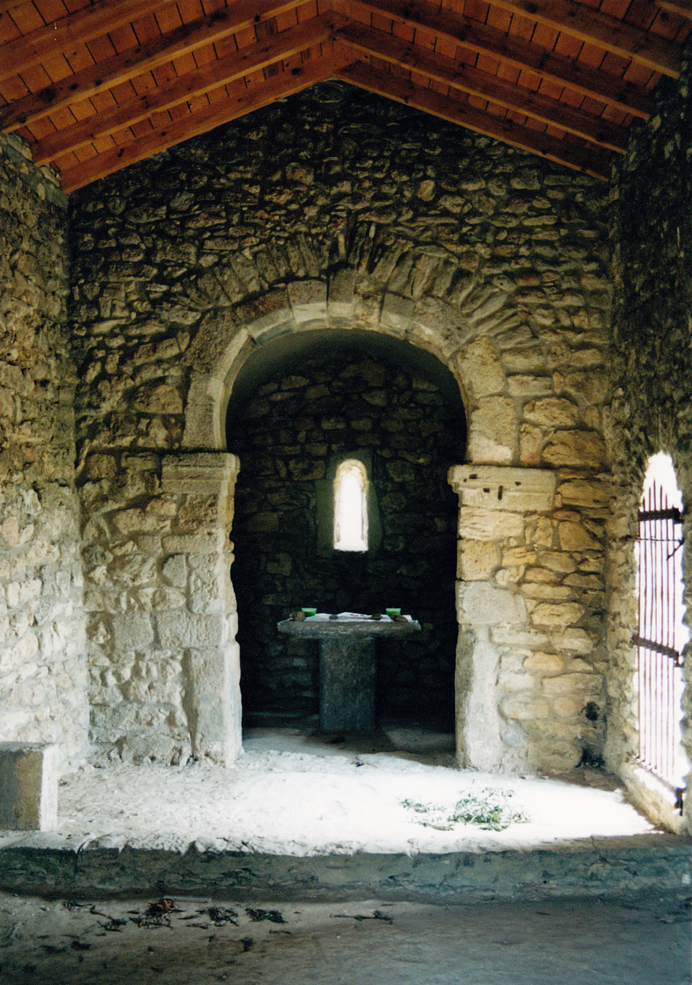 France - Languedoc - chapelle Saint-Laurent de Moussan (préroman) : la nef et l'arc triomphal outrepassé de tradition wisigothique